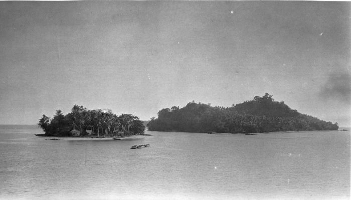 Foto. Het eiland Jellesma nabij Paleleh